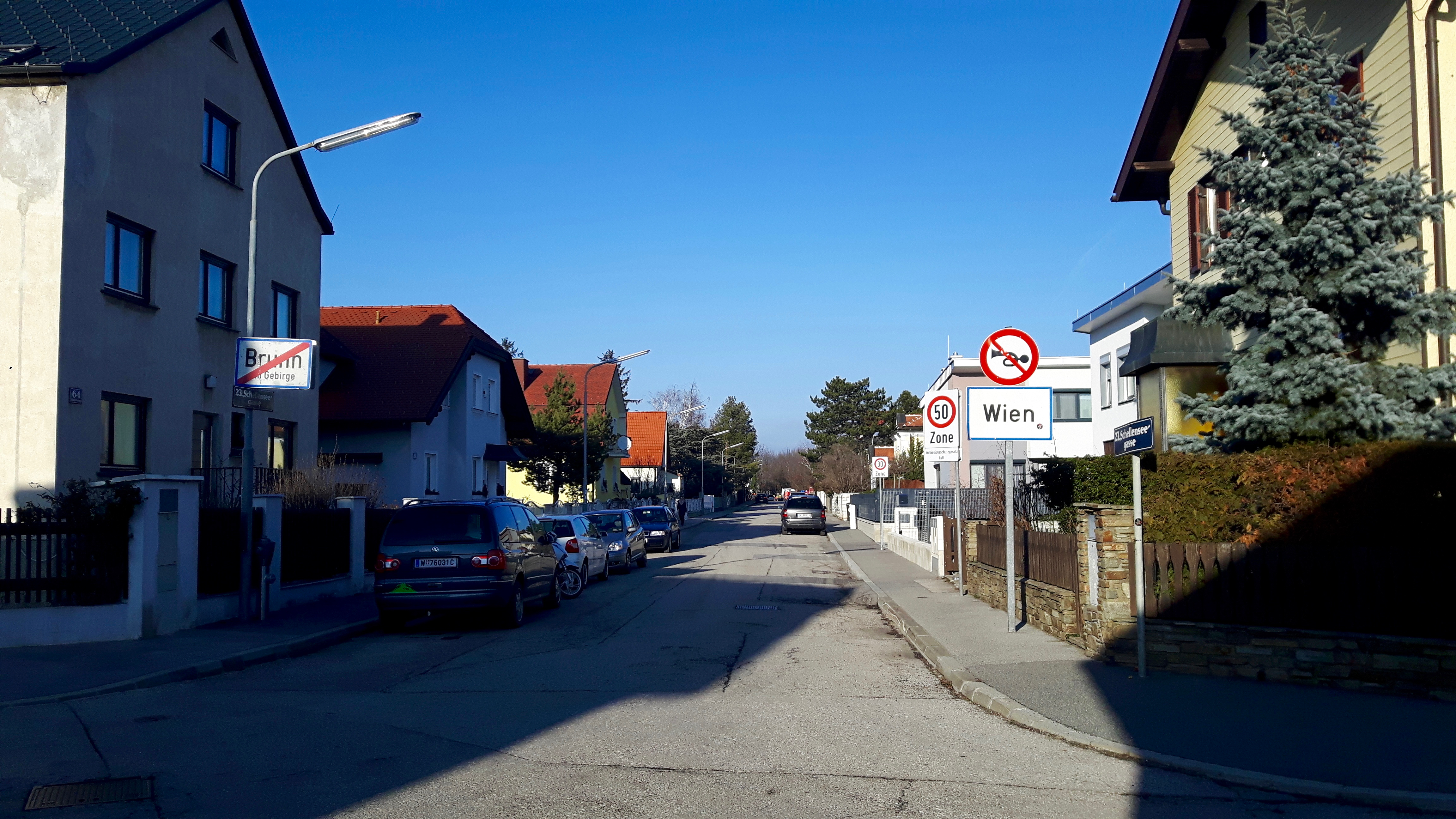 Schellenseegasse in Wien-Siebenhirten.